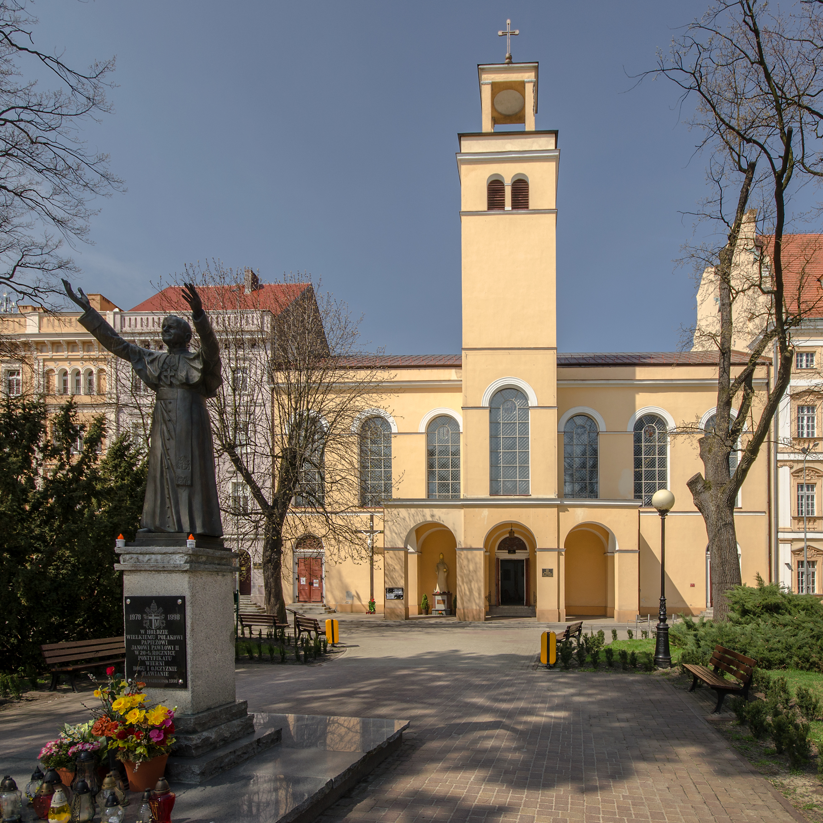 Oława, kościół ewangelicki, ob. rzym.-kat. par. p.w. śś. Piotra i Pawła, 1835, 1928, 1938